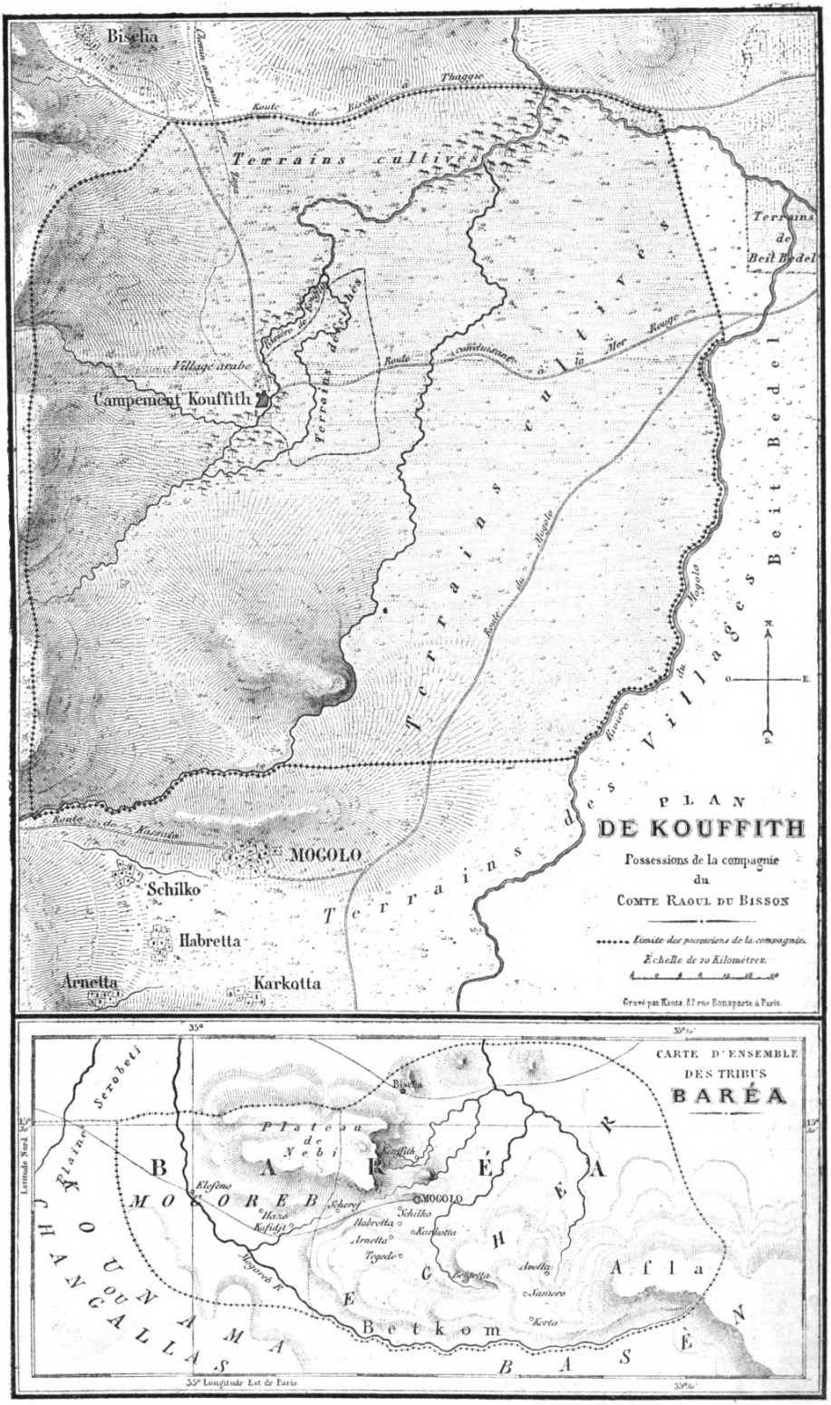 Plan de Kouffith et carte d'ensemble des tribus Baréa.